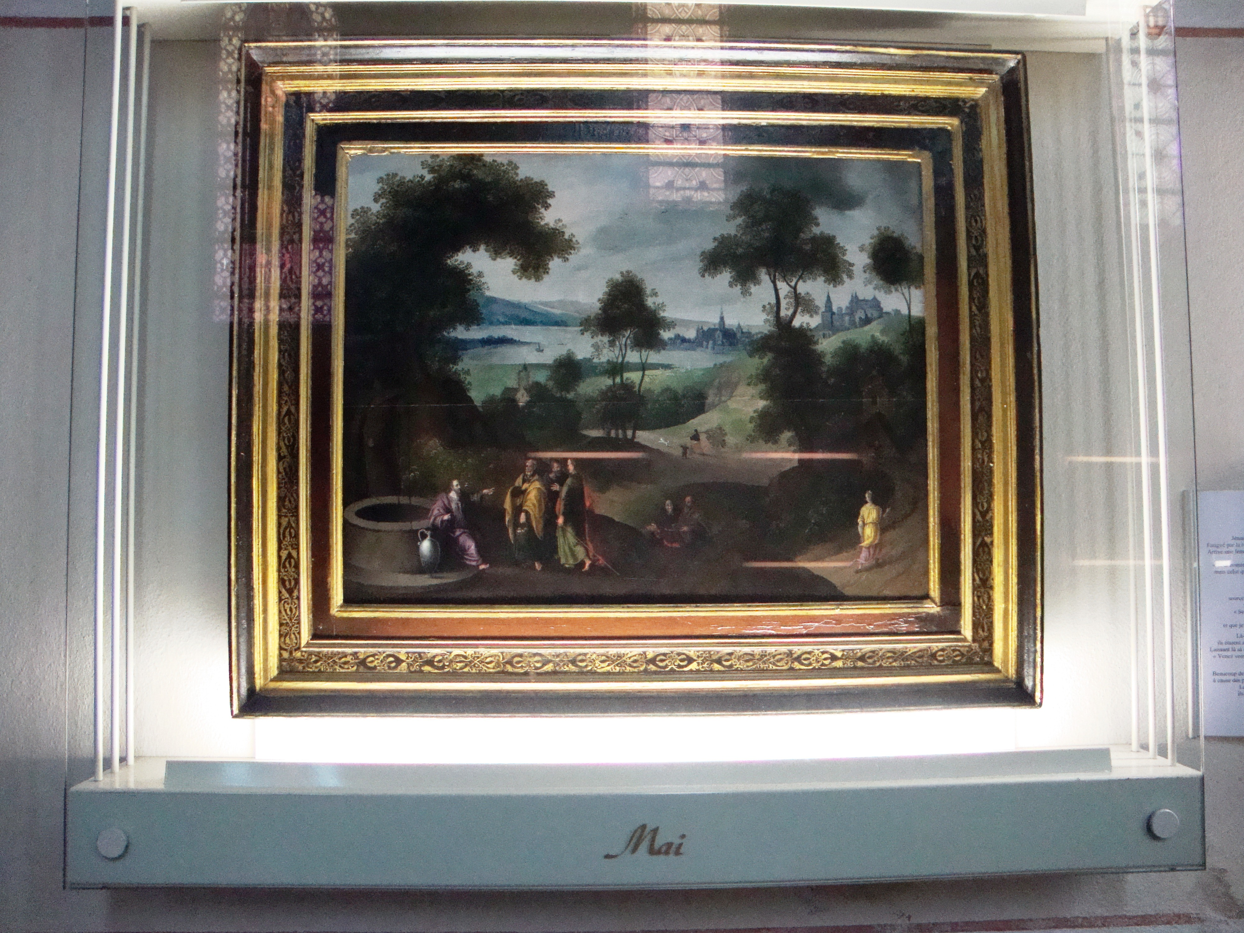 Montfaucon_(Haute-Loire,_Fr), dans la chapelle Notre Dame, un des 12 peintures de Grimmer (1592, école flamande) representant les 12 mois: le mois de mai.